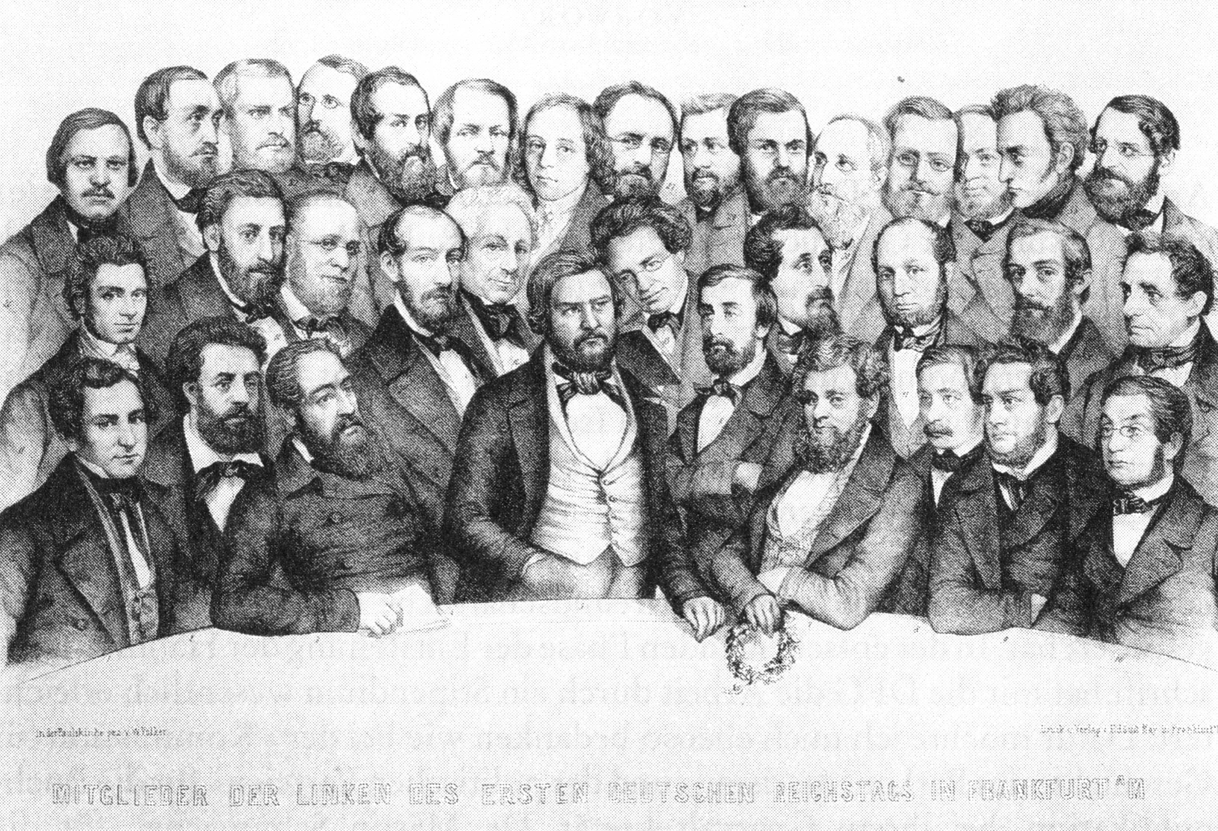 Lithographie, Wilhelm Völker, 1849. “Mitglieder der Linken des ersten deutschen Reichstags in Frankfurt a. M.”. Am Tisch von links nach rechts: Wilhelm Loewe (1), Julius Fröbel (2), Friedrich Wilhelm Schlöffel (3), Lorenz Brentano (4, Kopf in der zweiten Reihe), Carl Vogt (5), Ludwig Simon (6), Robert Blum (7, mit Ehrenkranz, bereits hingerichtet), Arnold Ruge (8), Franz zitz (9), Jakob Bernhard Eisenstuck (10). Zweite Reihe: Georg Friedrich Kolb (11), Franz Jakob Wigard (12), August Rühl (13), Adam von Itzstein (149), Wilhelm Zimmermann (15), Franz Raveaux (16), Joseph Peter (17), Franz Schuselka (18), Albert Schott (19). Letzte Reihe: Adolf Schoder (20), Wilhelm Adolf von Trützschler (21), Carl Giskra (22), Jakob Venedey (23), Karl Nauwerck (24), Christian Schüler (25), Johann Georg August Wirth (26), Jodocus Temme (27), Wilhelm Michael Schaffrath (28), Hugo Wesendonck (29), Adolf Rösler (30), Karl Hagen (31), Carl Alexander Spatz (32), Gottlob Tafel (33), Heinrich Simon (34).